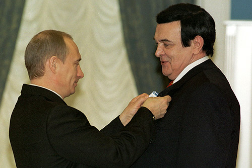 МОСКВА, КРЕМЛЬ. Церемония вручения государственных наград. Орденом Почета награжден певец Муслим Магомаев.